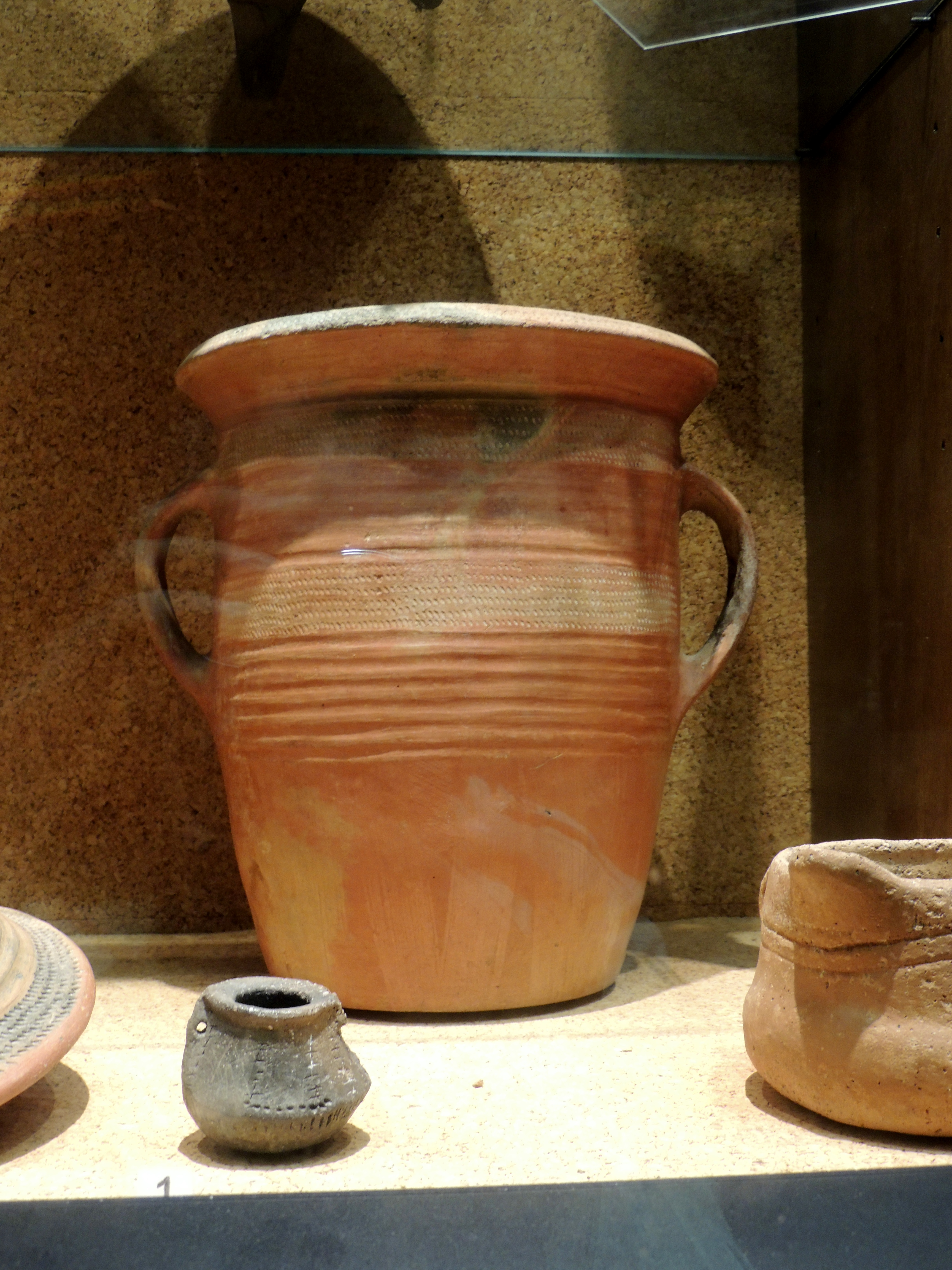 MONTE CLARO CIVILIZATION. Museo archeologico nazionale di Cagliari.